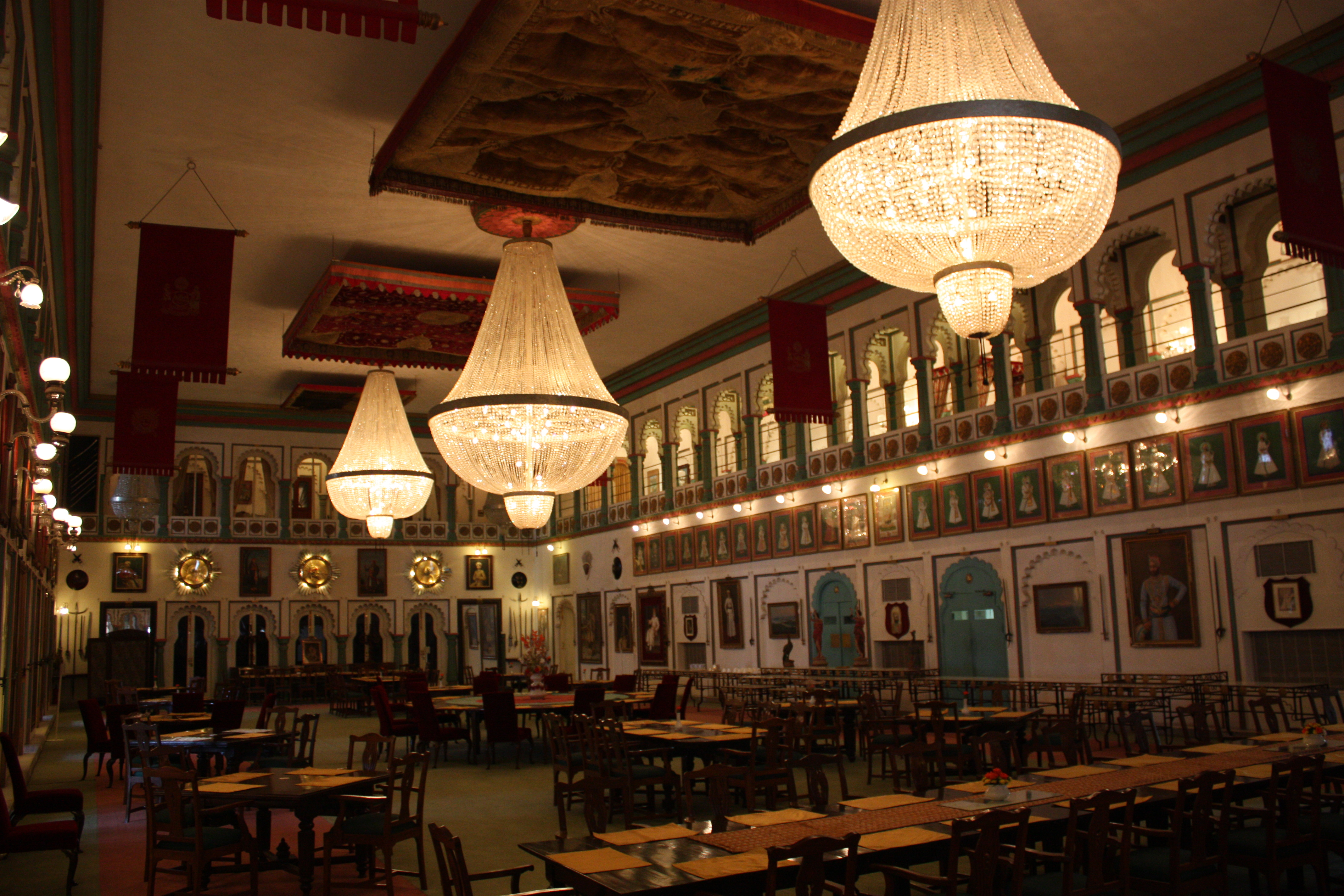 Udaipur, Fateh Prakash Palace Hotel, Durbar Hall